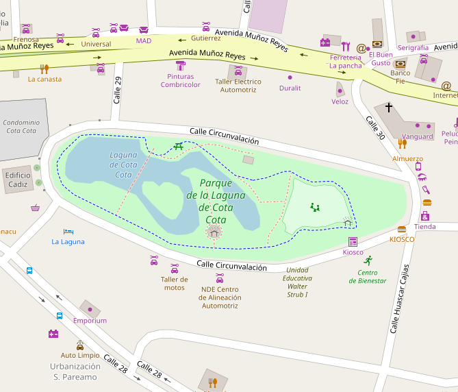 Mapa de la laguna